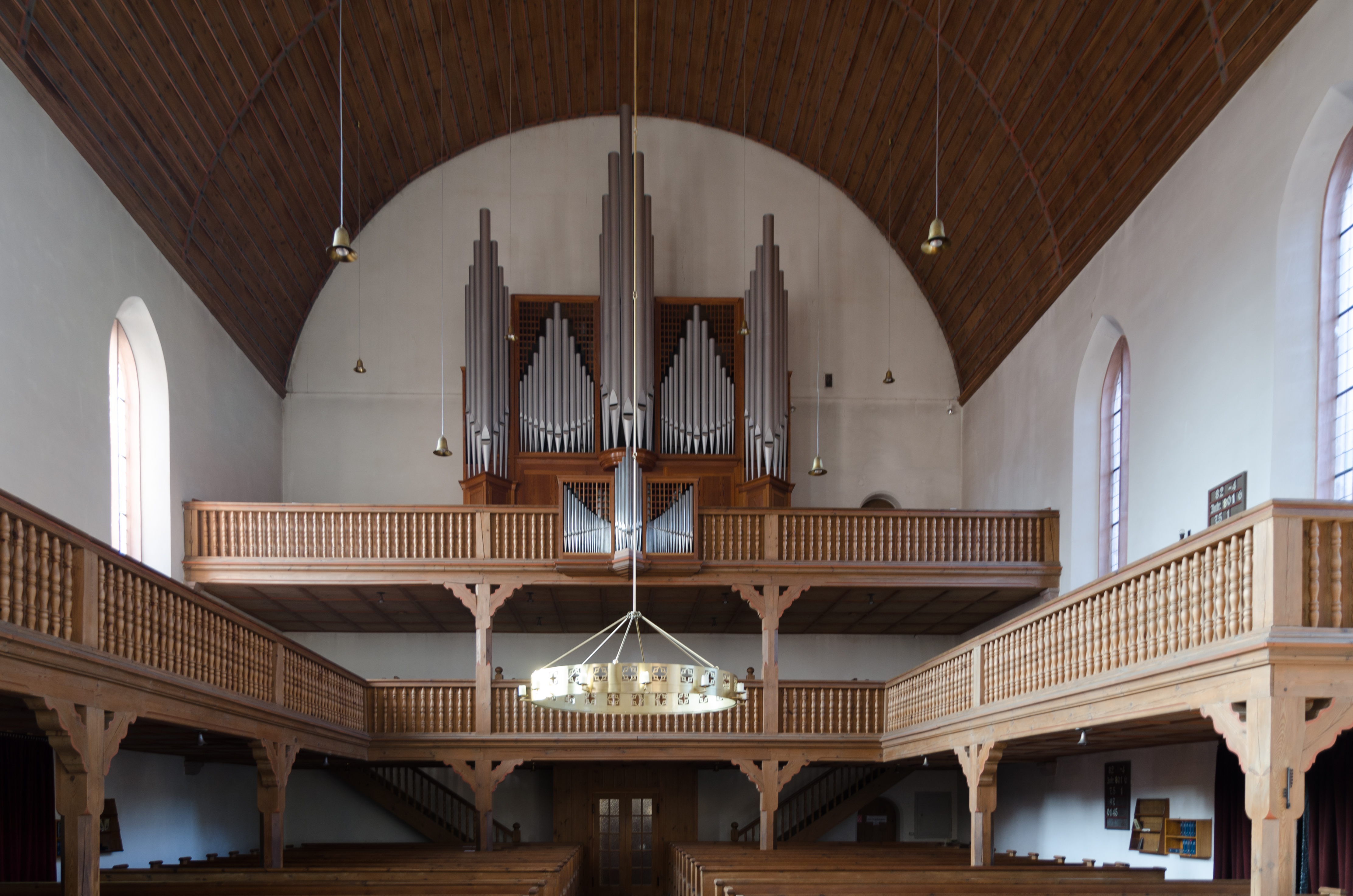 Merkendorf, ev. Stadtpfarrkirche Unser Lieben Frau